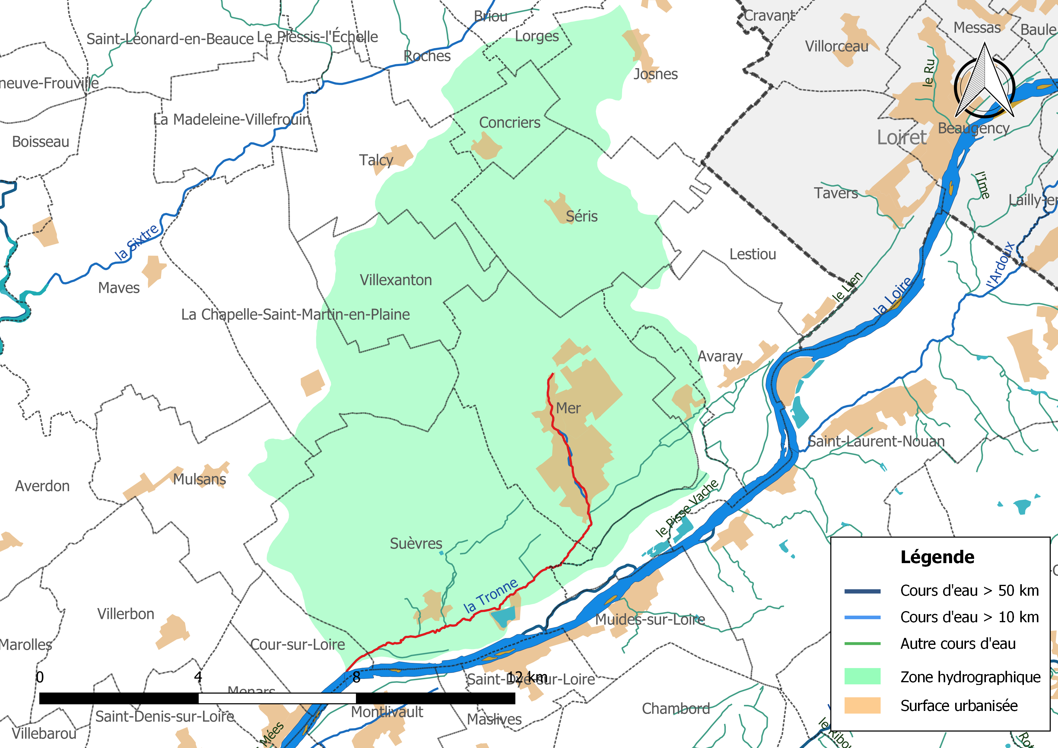 Carte du cours d'eau « la Tronne » et de son bassin versant (zone hydrographique dans laquelle il s'insère).